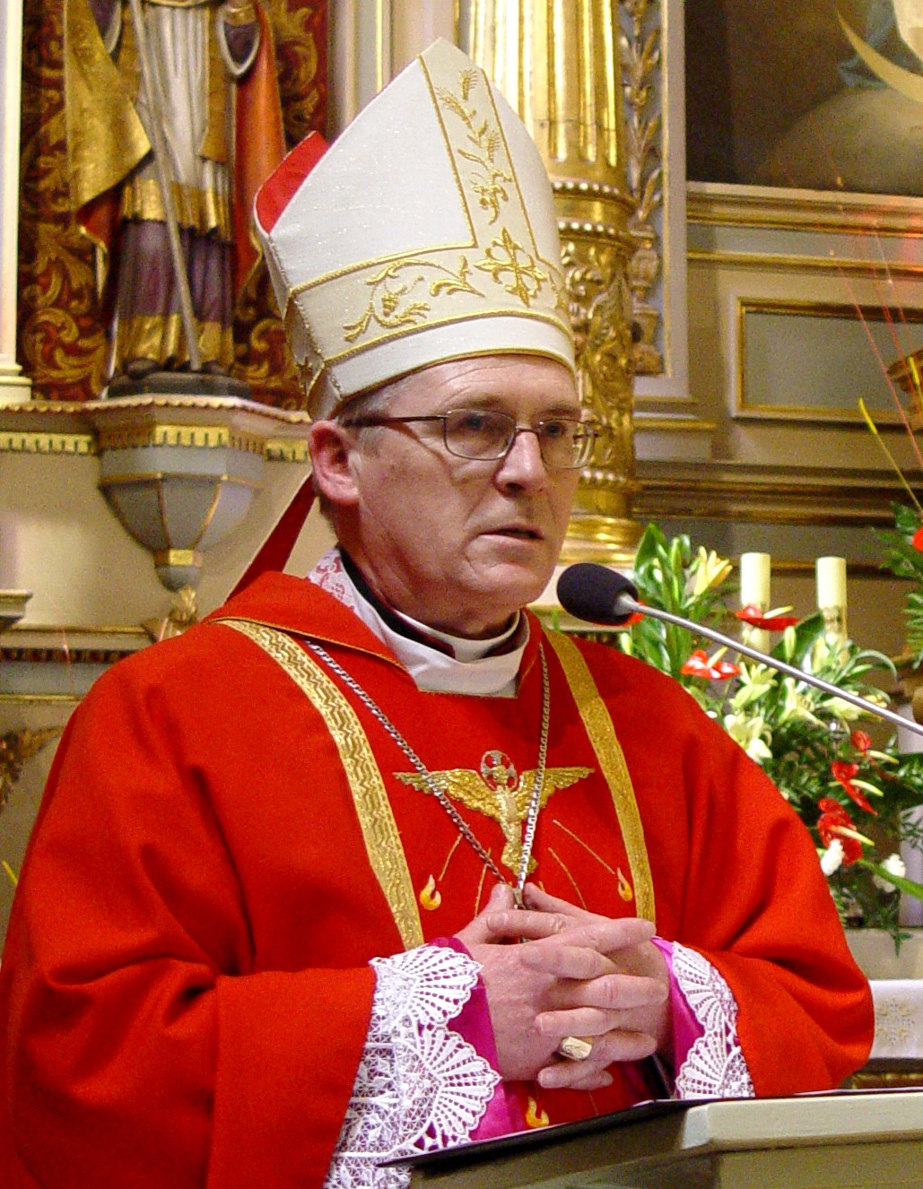 Bp Kazimierz Gurda, Msza Święta w intencji harcerzy w Kościele Niepokalanego Poczęcia Najświętszej Marii Panny w Busku-Zdroju.